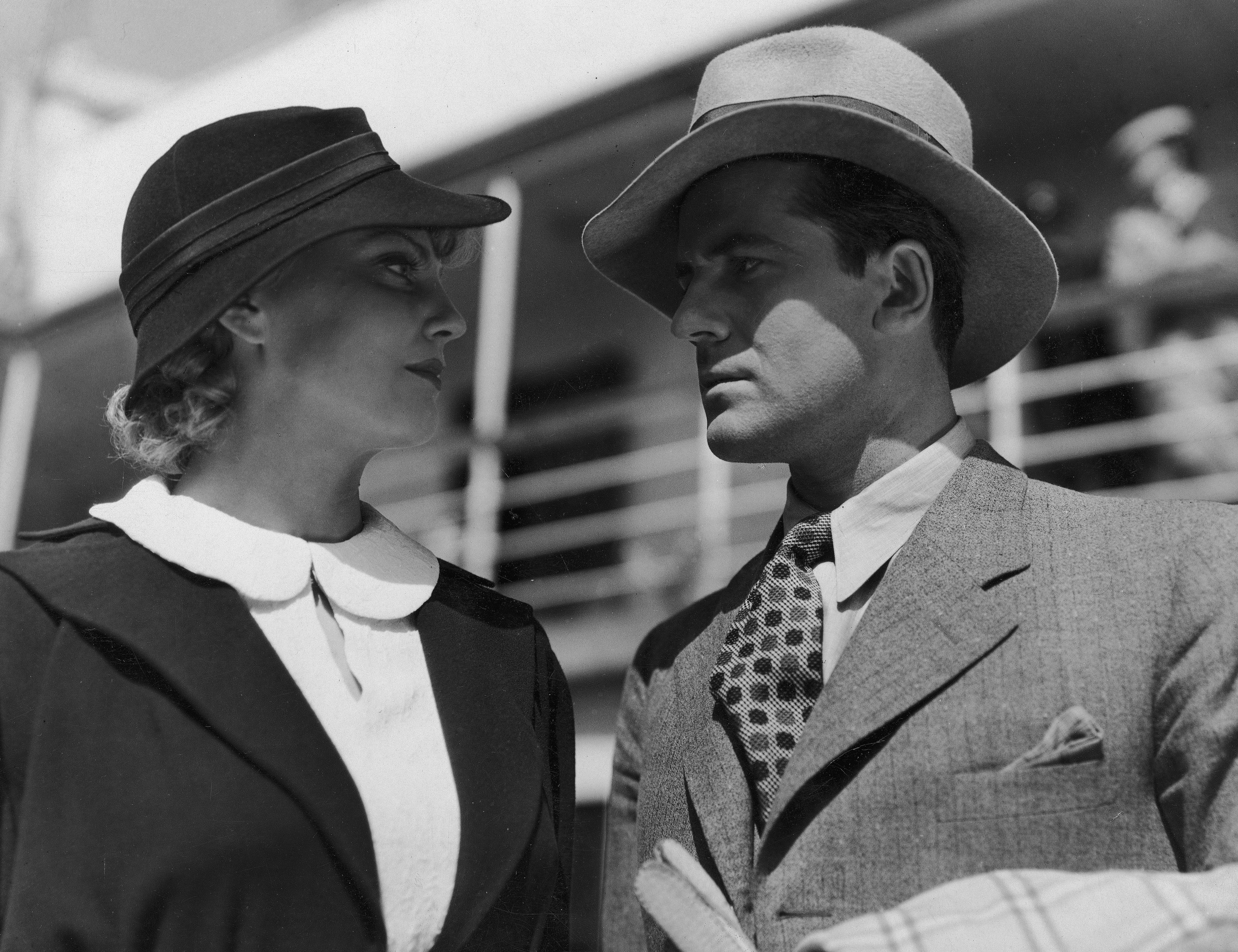 Maria Bogda jako Janka Zatorska i Adam Brodzisz jako Adam Halny w jednej ze scen filmu "Rapsodia Bałtyku", 1935 r.